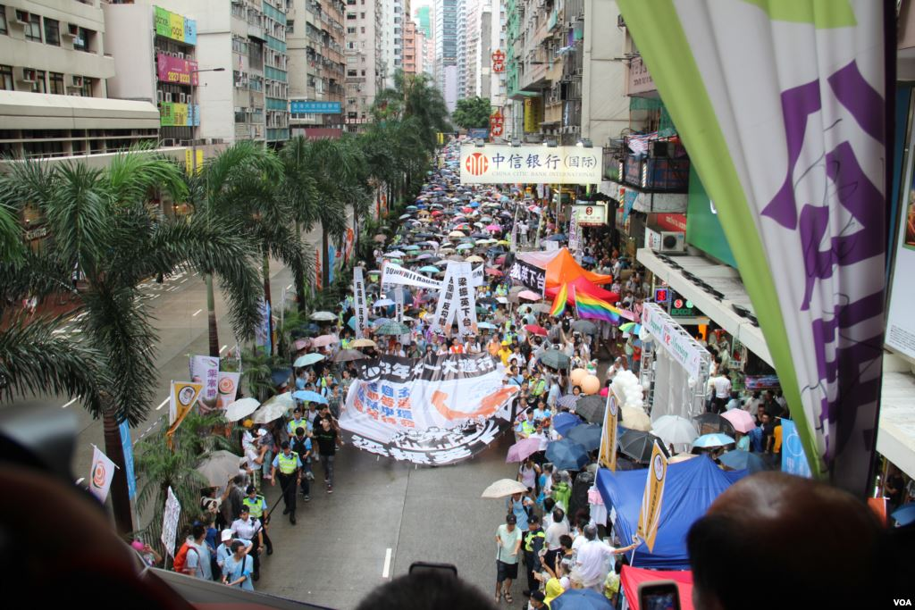 香港几十万市民上街参加七一大游行要求真普选 (美国之音海彦拍摄)